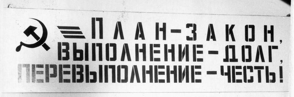 Лозунг «План — закон, выполнение — долг, перевыполнение — честь!» в здании Ольховско-Батьковского торфяного предприятия в Кубринске, Переславский район.